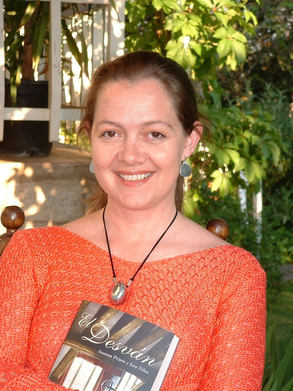 Susana Prieto, tras la presentación de su primera novela "El desván", 2003.